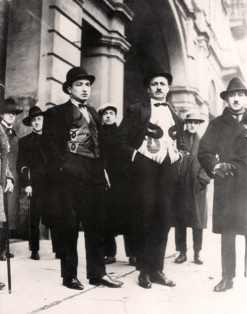 Fotografia non artistica scattata in Italia. In prima fila, da sinistra verso destra: Fortunato Depero (1892-1960), Filippo Tommaso Marinetti (1876-1944) e Francesco Cangiullo (1884-1977). In seconda fila, tra Depero e Marinetti: Gianni Mattioli (1903-1977) – vedi pagina di discussione